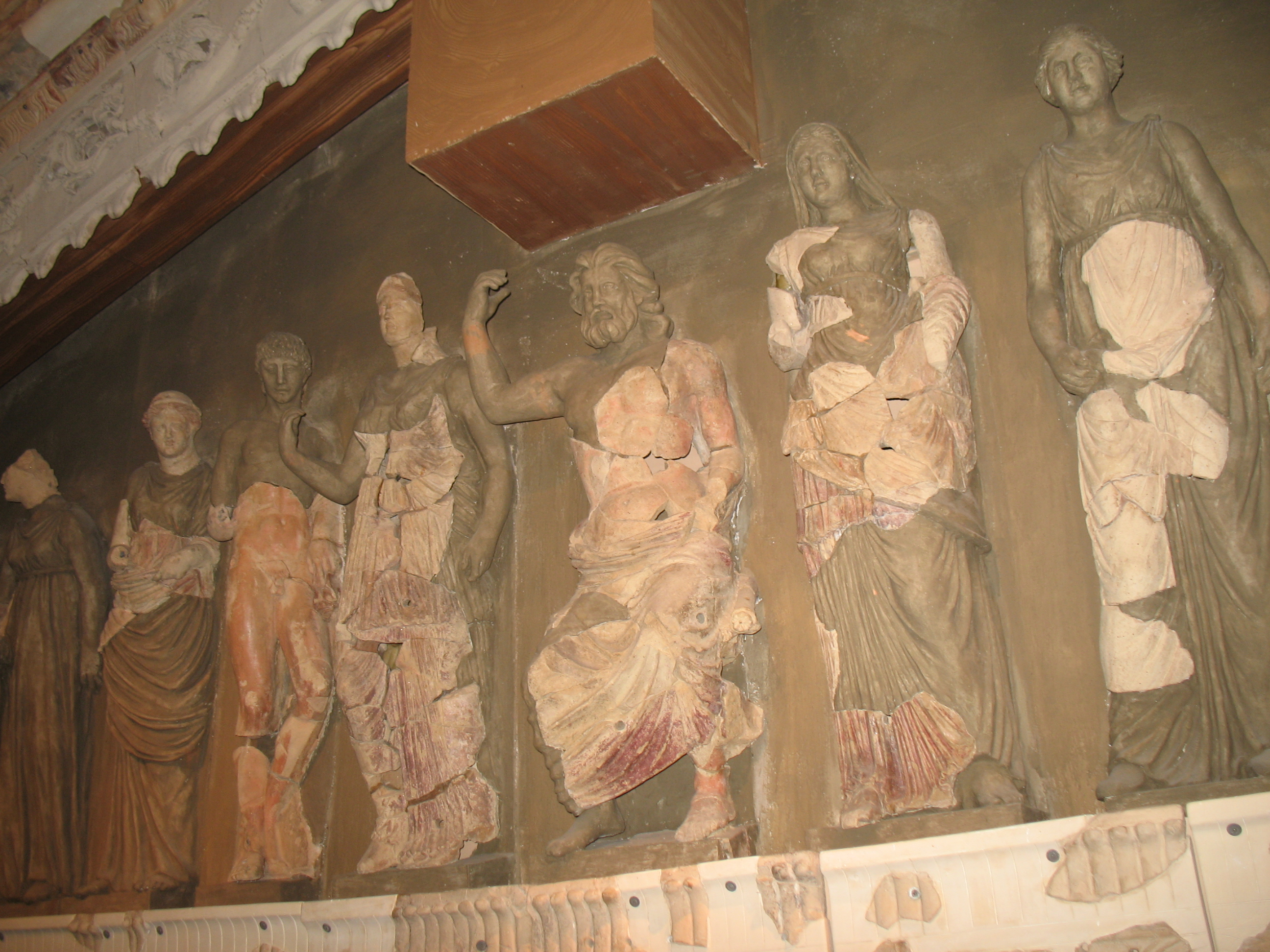 Frontone parzialmente ricostruito dell'antica Teate custodito nel Museo archeologico La Civitella di Chieti